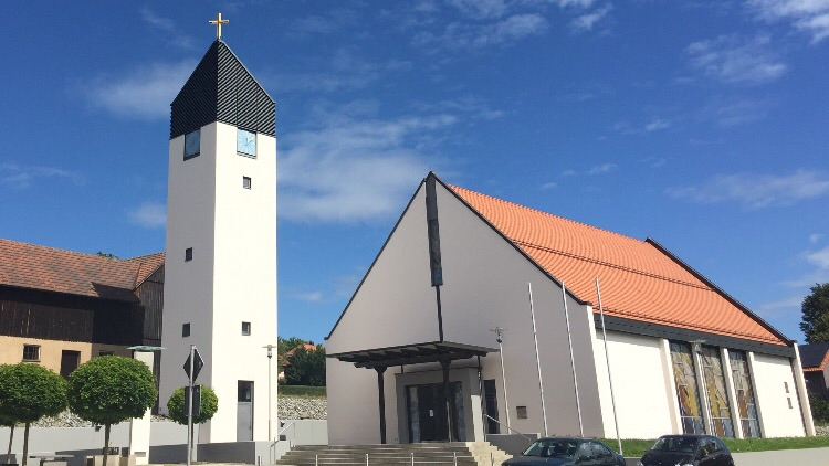 St. Johannes Nepomuk in Letzau - Beispiel für einen modernen Kirchenbau(Baujahr 2005)